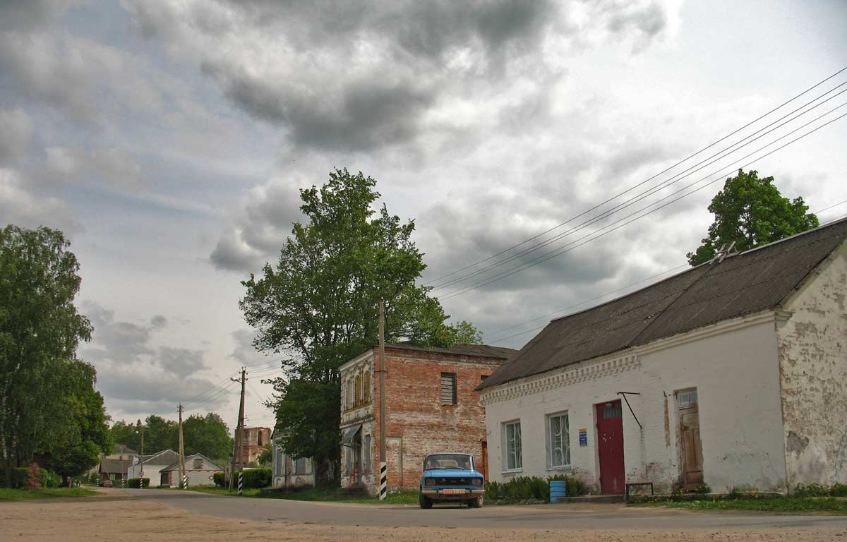 Беларуская (тарашкевіца): Друя